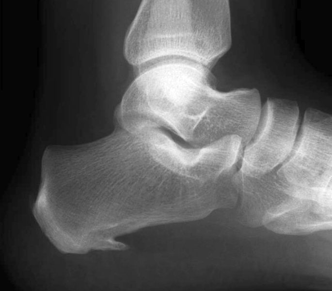 plantarer und kleiner dorsaler Fersensporn